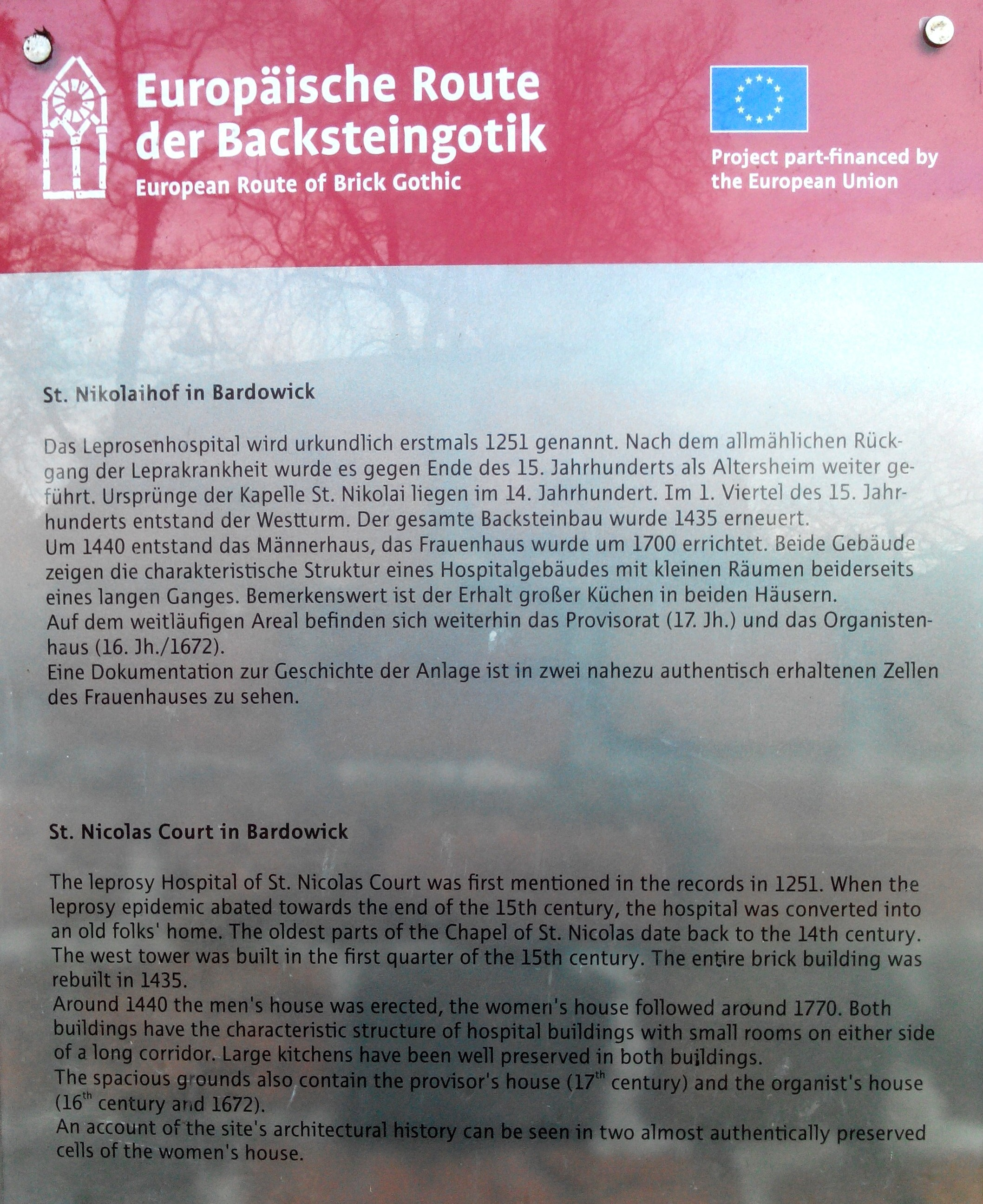 Zweisprachige Tafel der europäischen Route der Backsteingotik